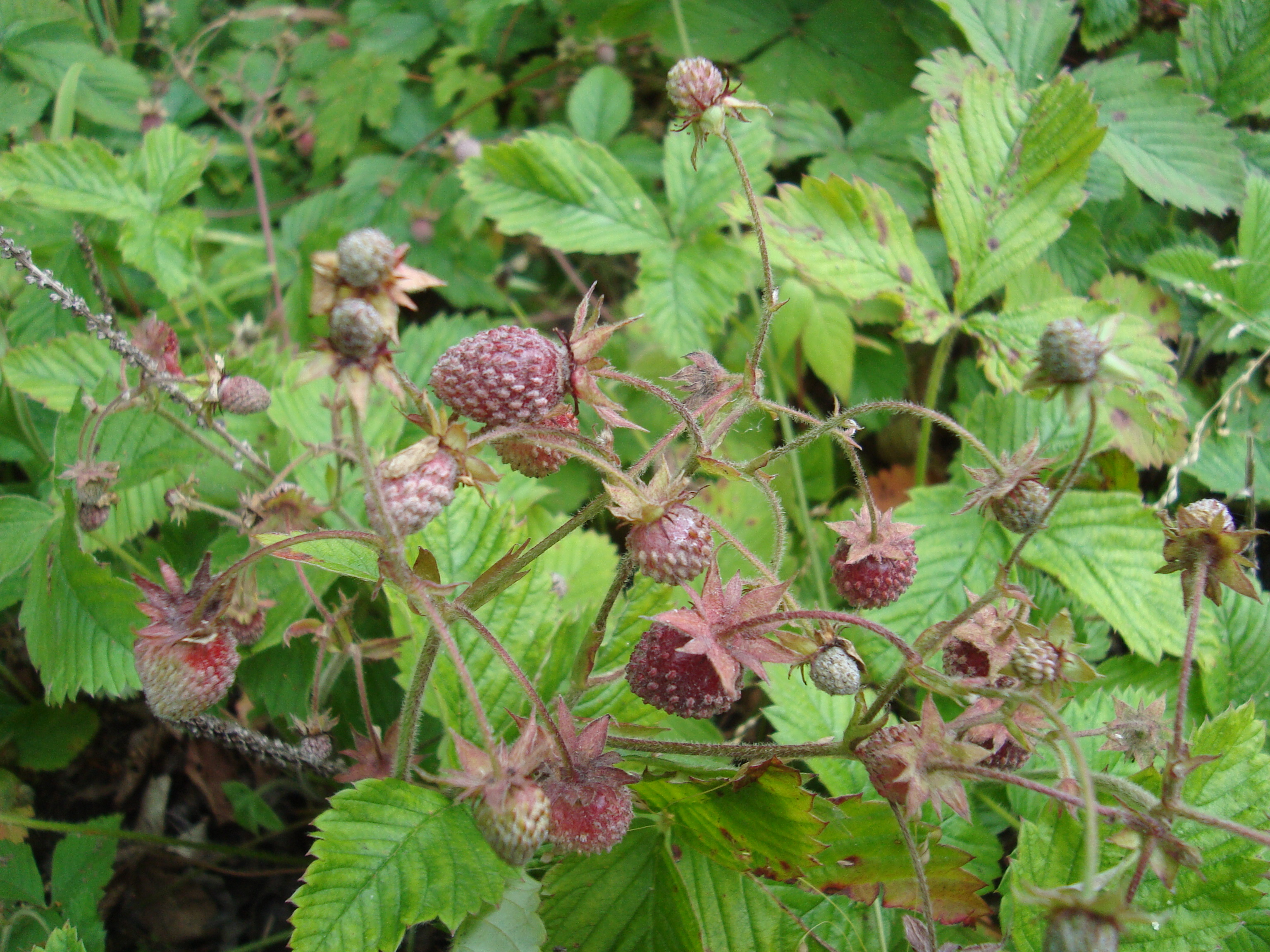 Fragaria moschata - fructus